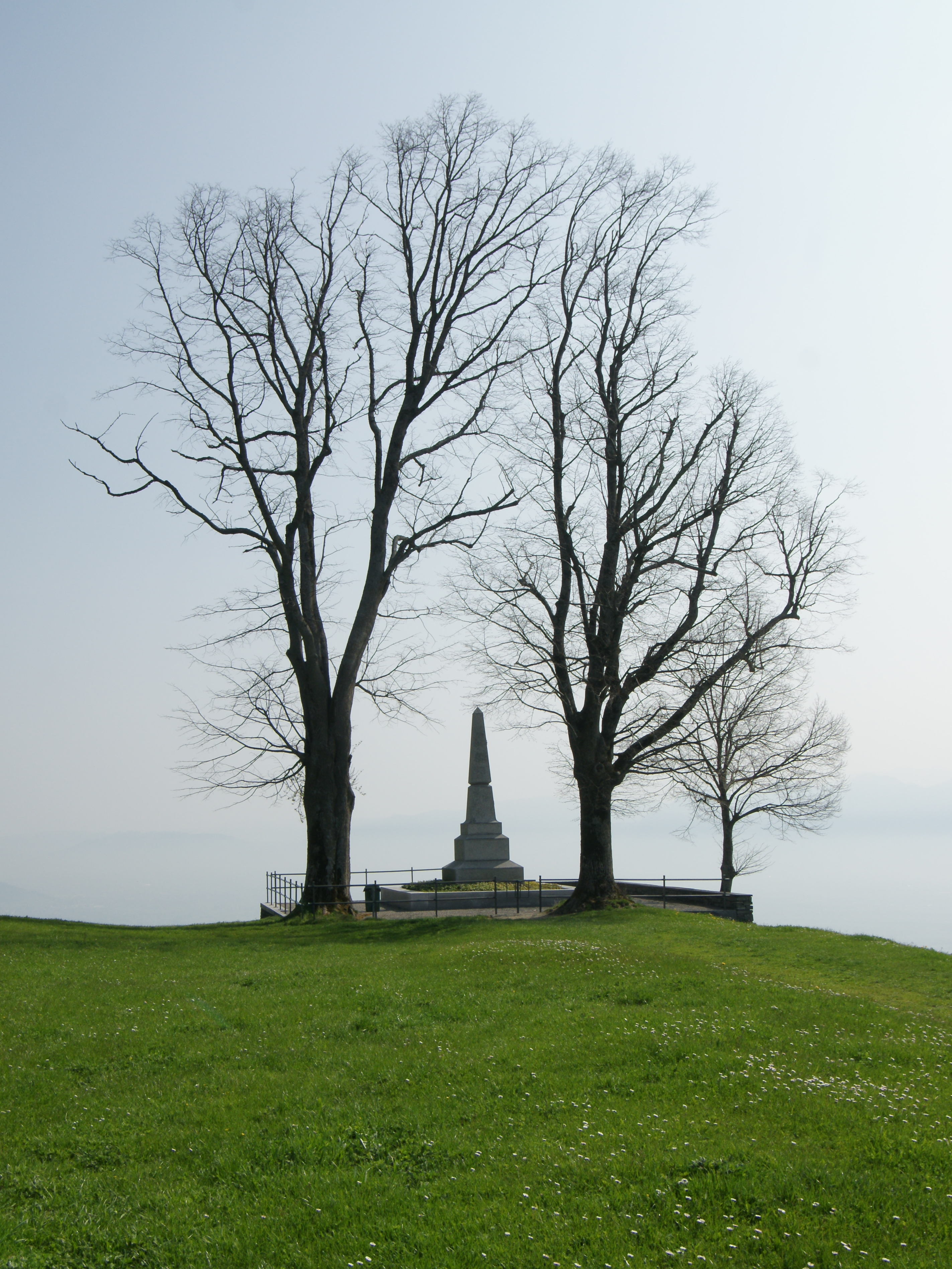 das Schlacht-Denkmal auf dem Stoss im (Kanton AR).